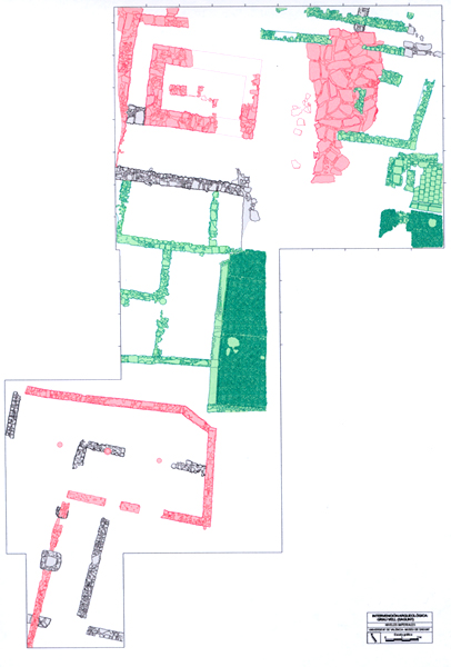 zone fouillée